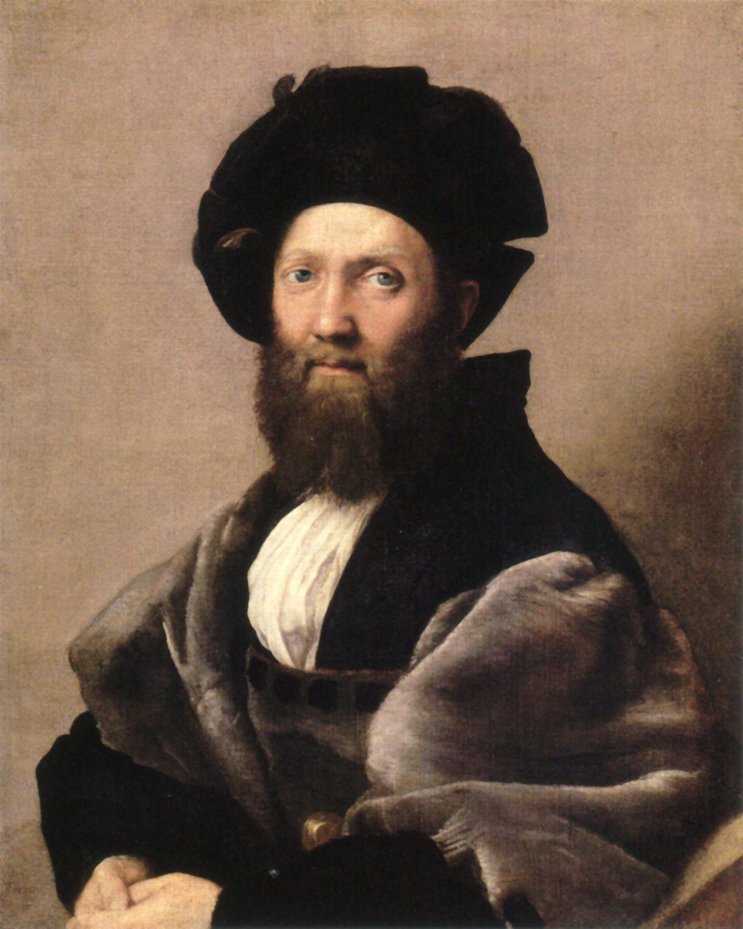 Portrait of Baldassare Castiglione. Oil on canvas, 820 x 670 mm (32 x 26 3/8"). Musée du Louvre, Paris.